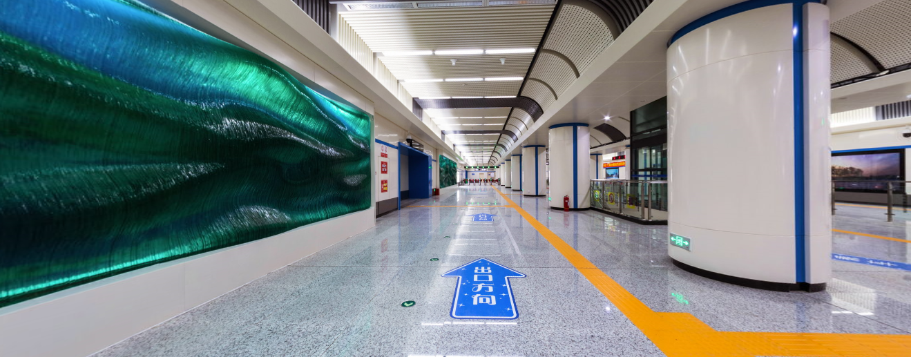 长春地铁2号线吉林大路站站厅